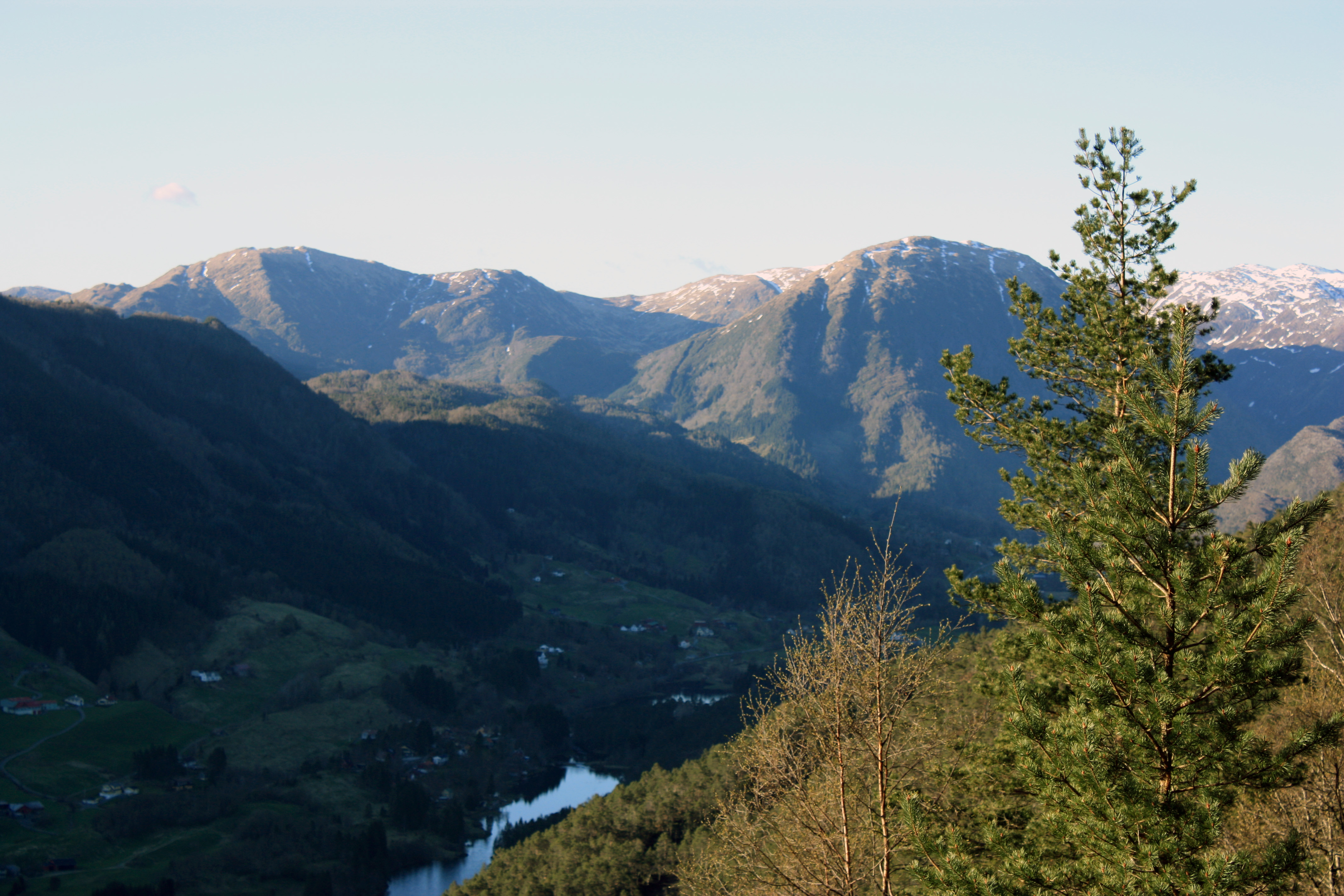 Hauglandsdalen, Fana, Bergen, Norway